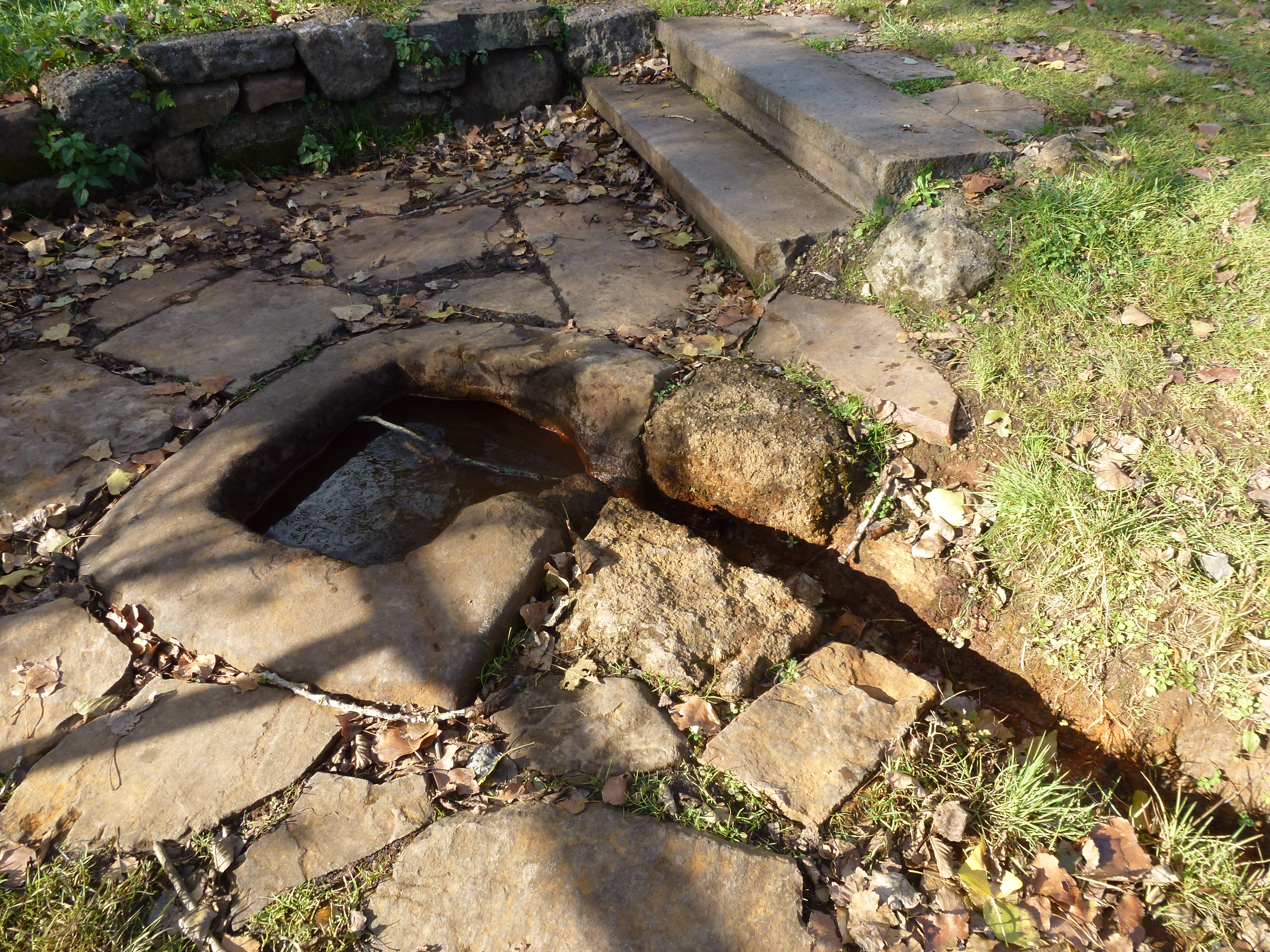 Steffelner Drees